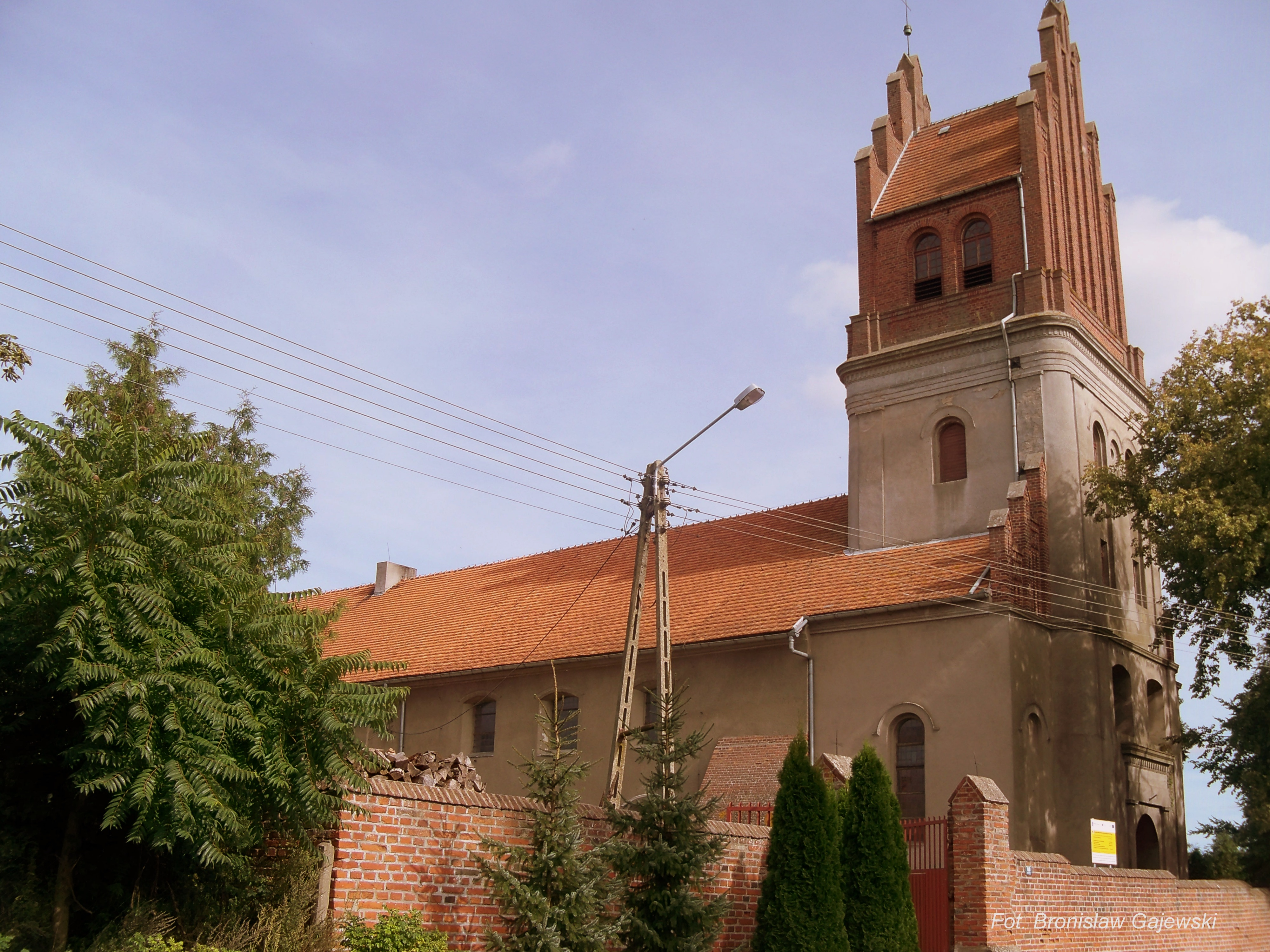 Bysławek - kościół klasztorny benedyktynek, obecnie parafialny pw. św. Wawrzyńca, z aneksem klasztornym, 1622, XIX w. (zabytek nr 5/71)